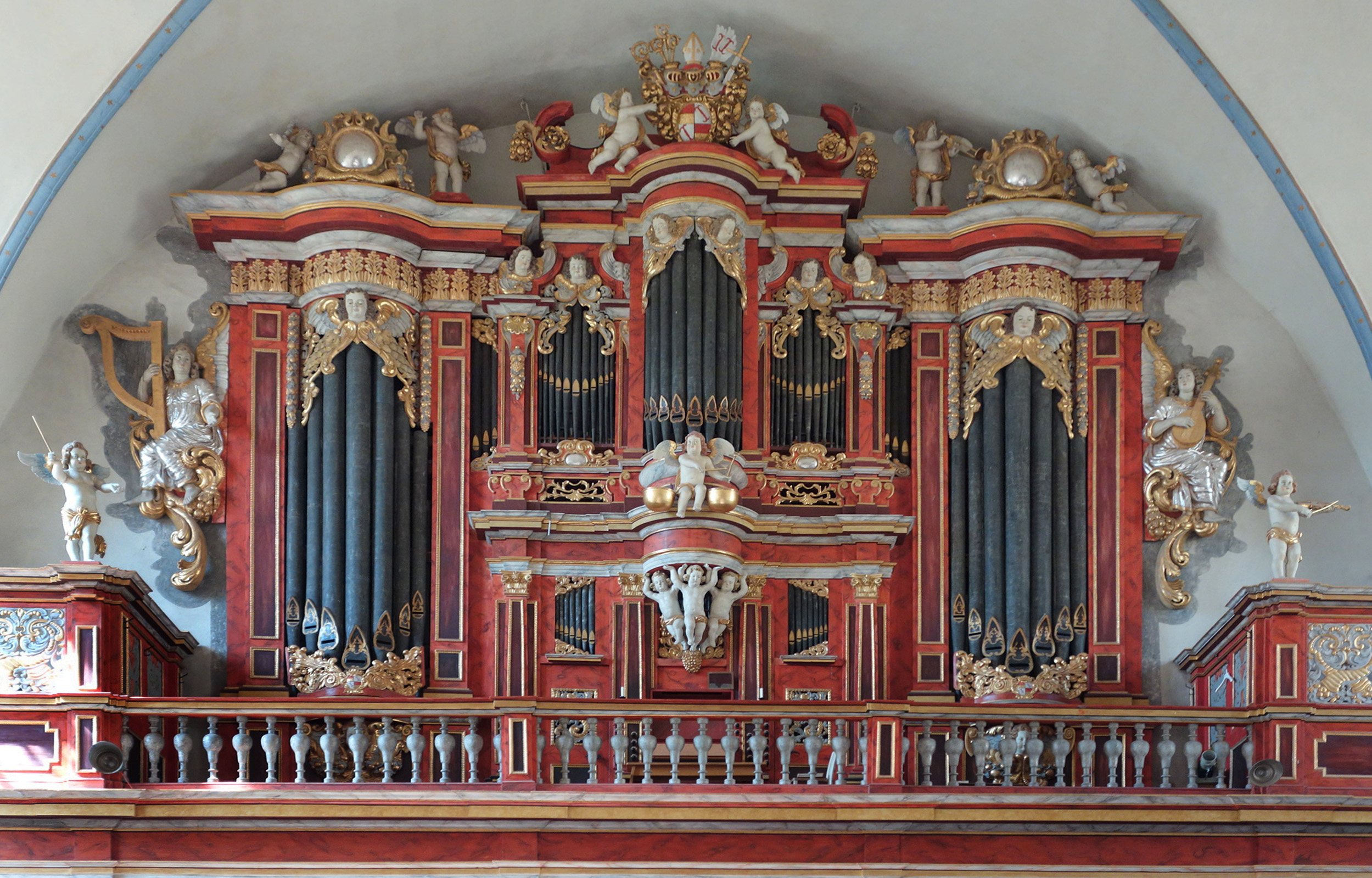 Orgel der Abteikirche Corvey, Nordrhein-Westfalen, Deutschland